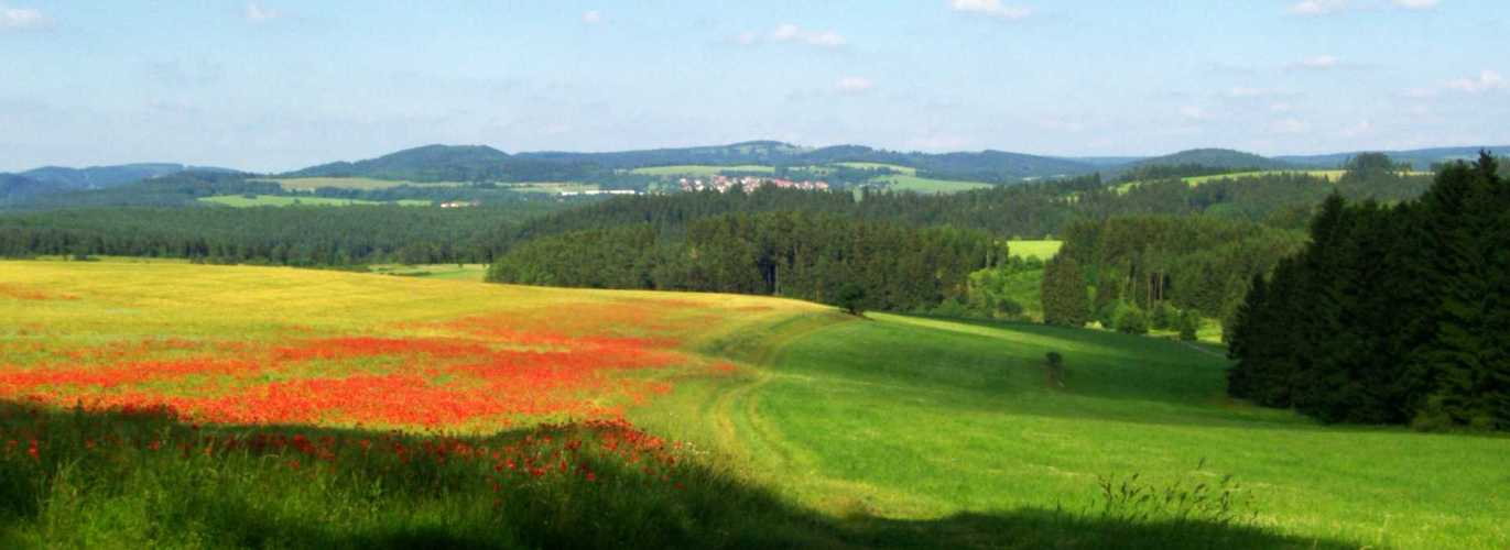 Der Simmersberg (781m, Mitte links) mit seinen Nebengipfeln Hohe Warth (718m, halblinks) und Kohlberg (718m, Mitte rechts) von Richtung Hildburghausen aus; halbrechts der Priemäusel (625m), ganz rechts ist im Hintergrund der Eckartsberg (760m) mit Waffenrod-Hinterrod erkennbar. Der mittig auf halber Höhe erkennbare Ort Merbelsrod liegt, wie auch die letztgenannten Berge, bereits "diesseits" des Bibertales, ist also durch eine Schlucht vom Simmersberg getrennt. Links im Hintergrund der Schwefelkopf (774 m) und sein linker Nebengipfel Sommerberg (756 m) hinter dem Tal der Schleuse. Links davon schließt sich, außerhalb des Bildausschnittes, derKalter Staudenkopf (768m) an.